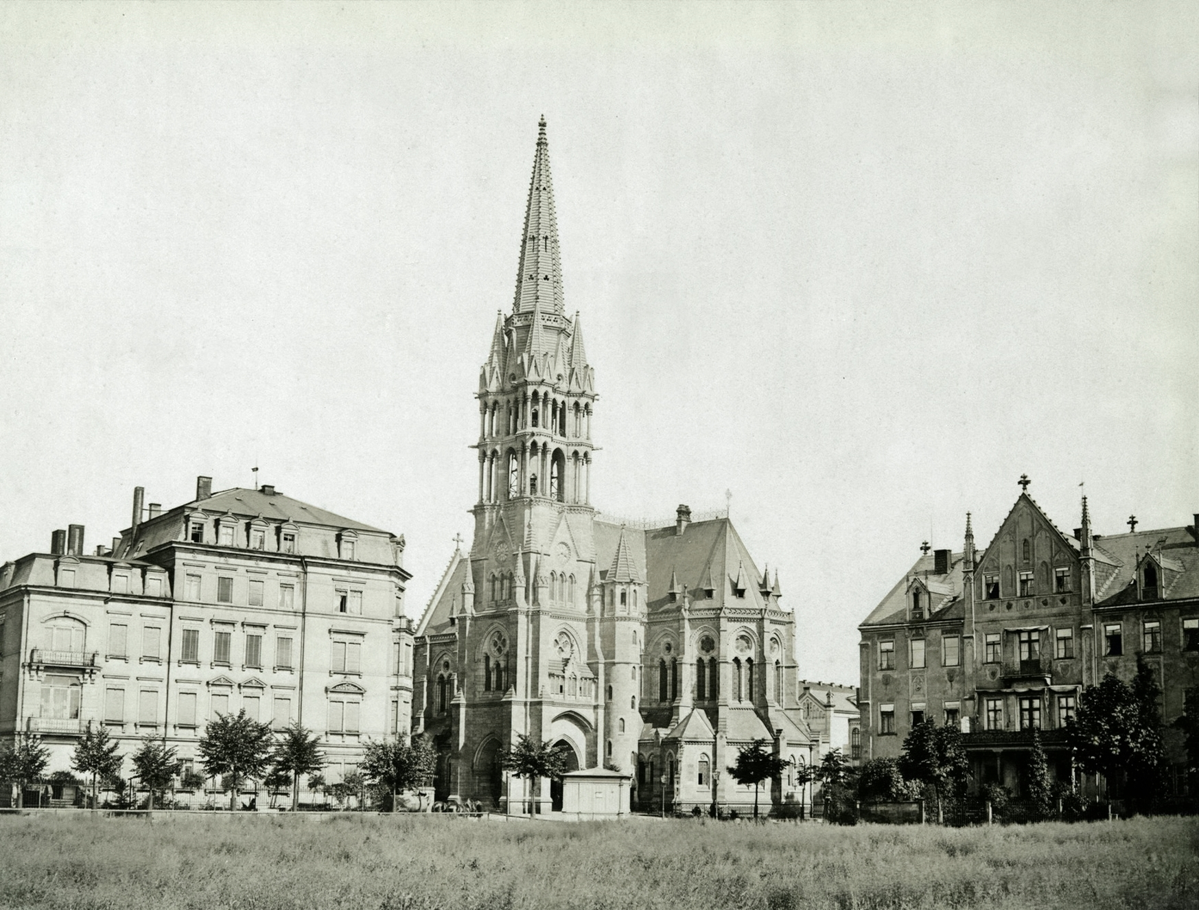 Johanniskirche in Dresden-Johannstadt, Südostansicht